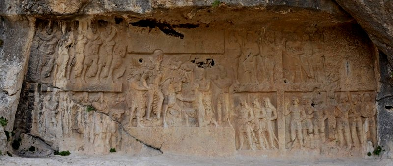 Vista geral do segundo relevo de Bixapur